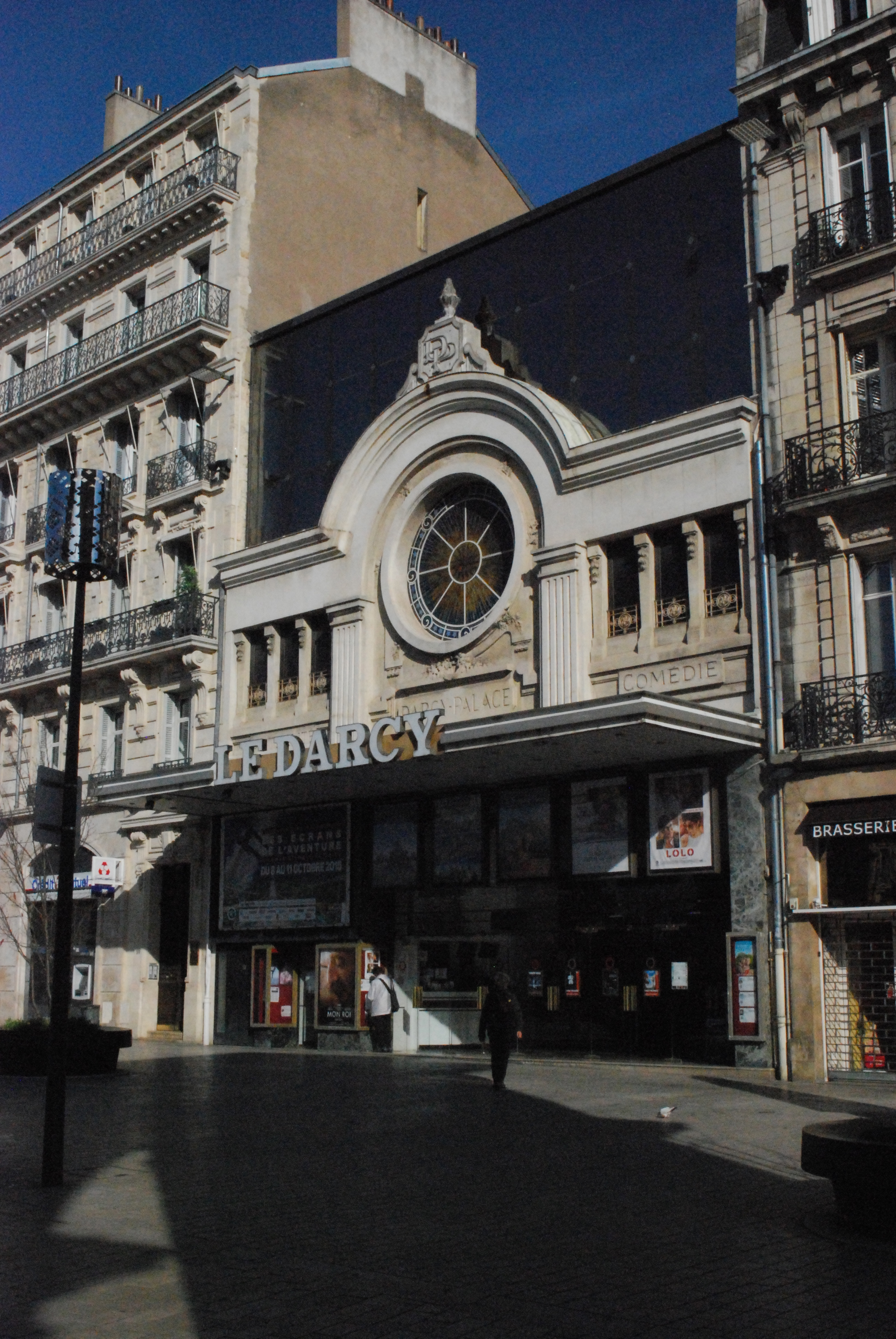 Vue de Dijon.